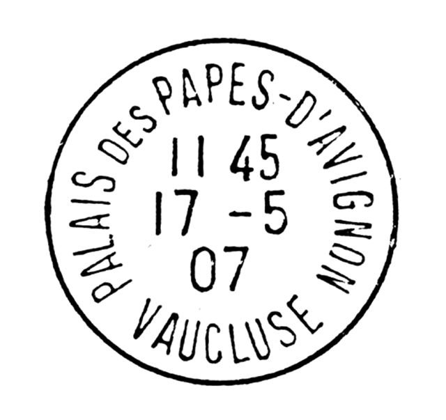 cachet de la poste du Palais des Papes daté de 1907